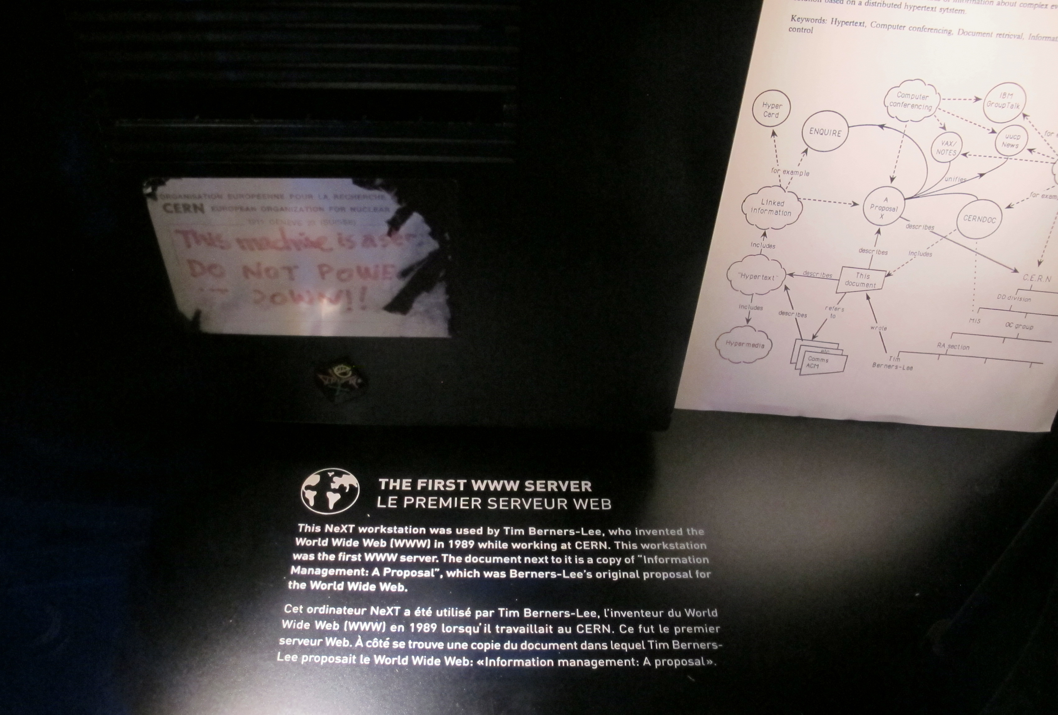 Ginevra